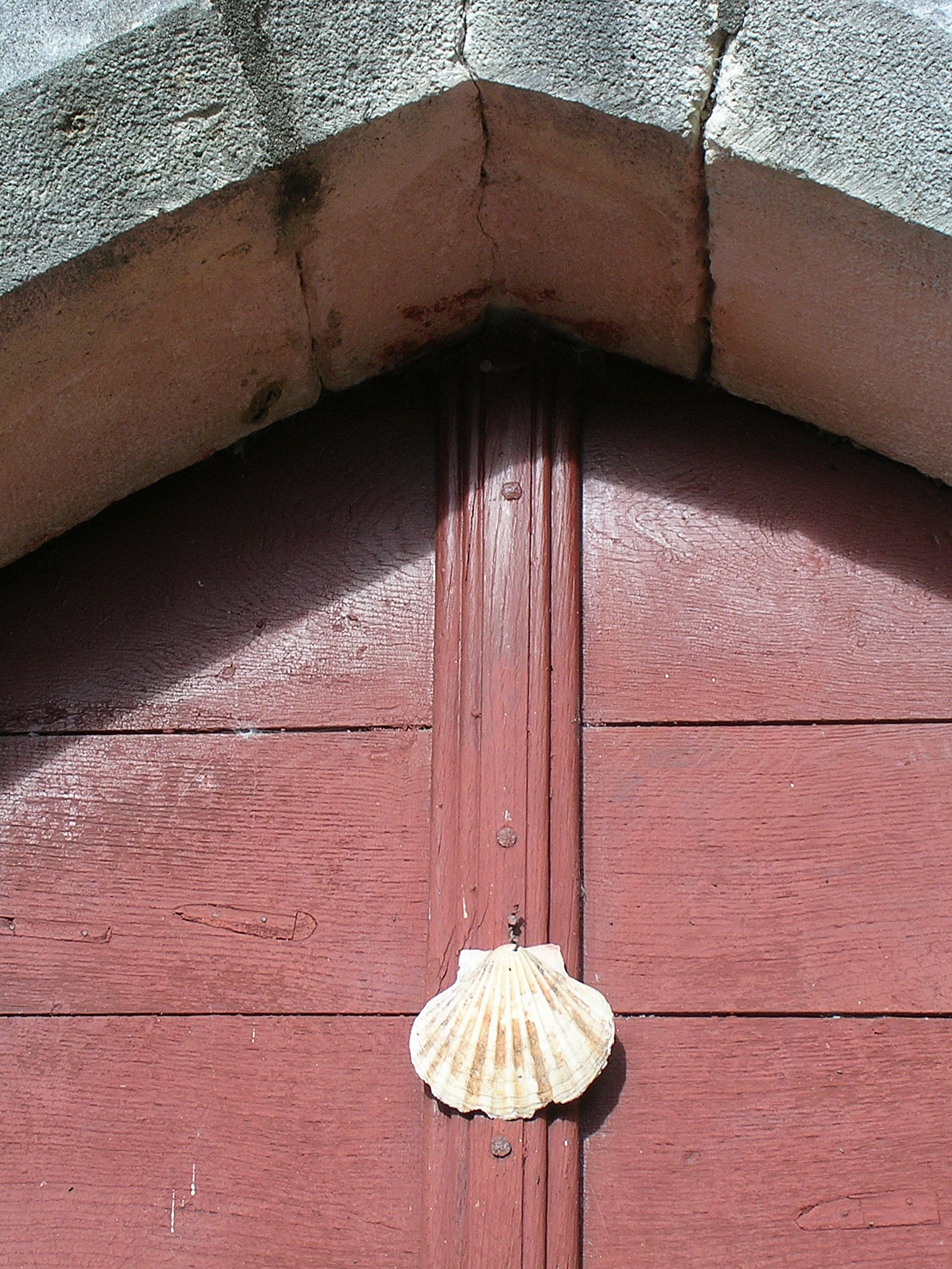 Eglise d'Audignon, dans le département français des Landes. Coquille Saint-Jacques sur la porte principale, marquant l'étape sur le chemin de Compostelle.